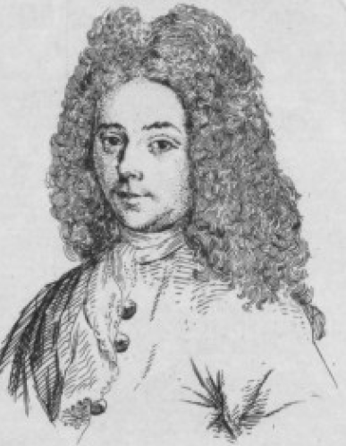 Philibert Gassot, dit Du Croisy, est un comédien de la troupe de Molière, né en 1626 et mort à Conflans-Sainte-Honorine le 3 mai 1695.